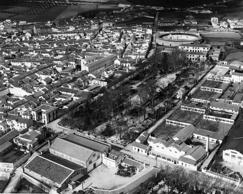 Vista aérea de Cabra. ¿Años 1960?